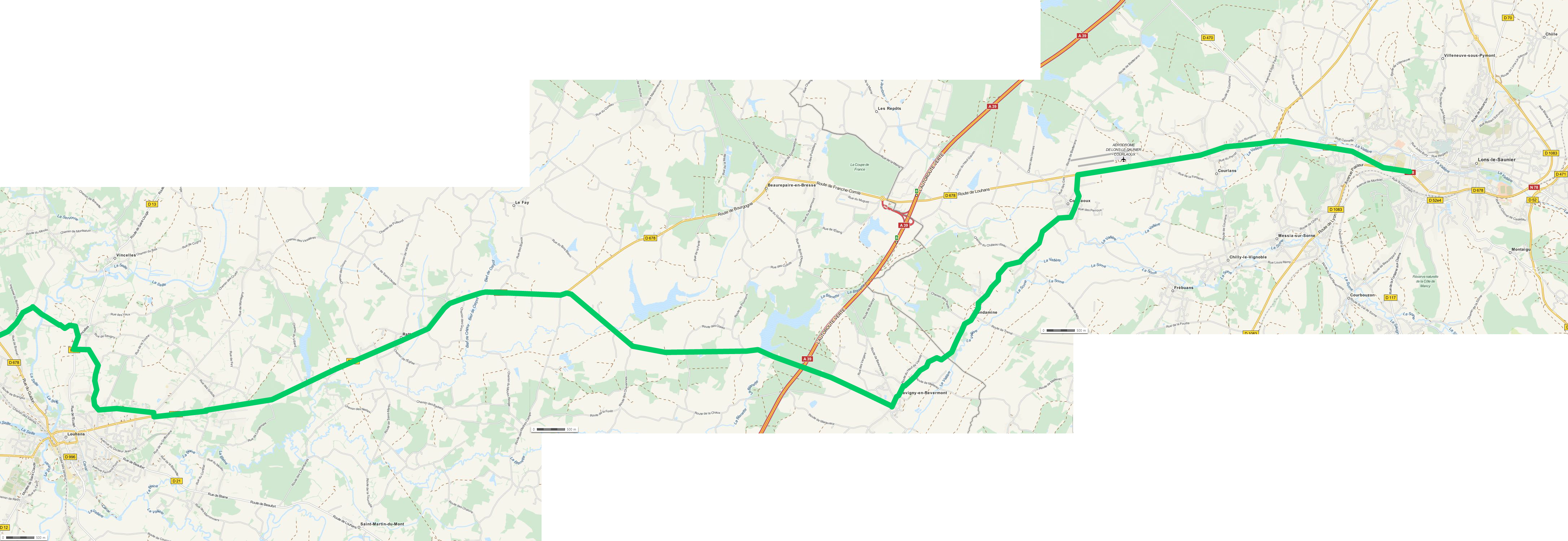 Karte der Römerstrasse von Chalon-sur-Saône nach Lons-le-Saunier, Teilstück Louhans-Lons Carte de la voie romaine de Chalon-sur-Saône à Lons-le-Saunier, partie Louhans-Lons This map may be incomplete, and may contain errors. Don't rely solely on it for navigation.